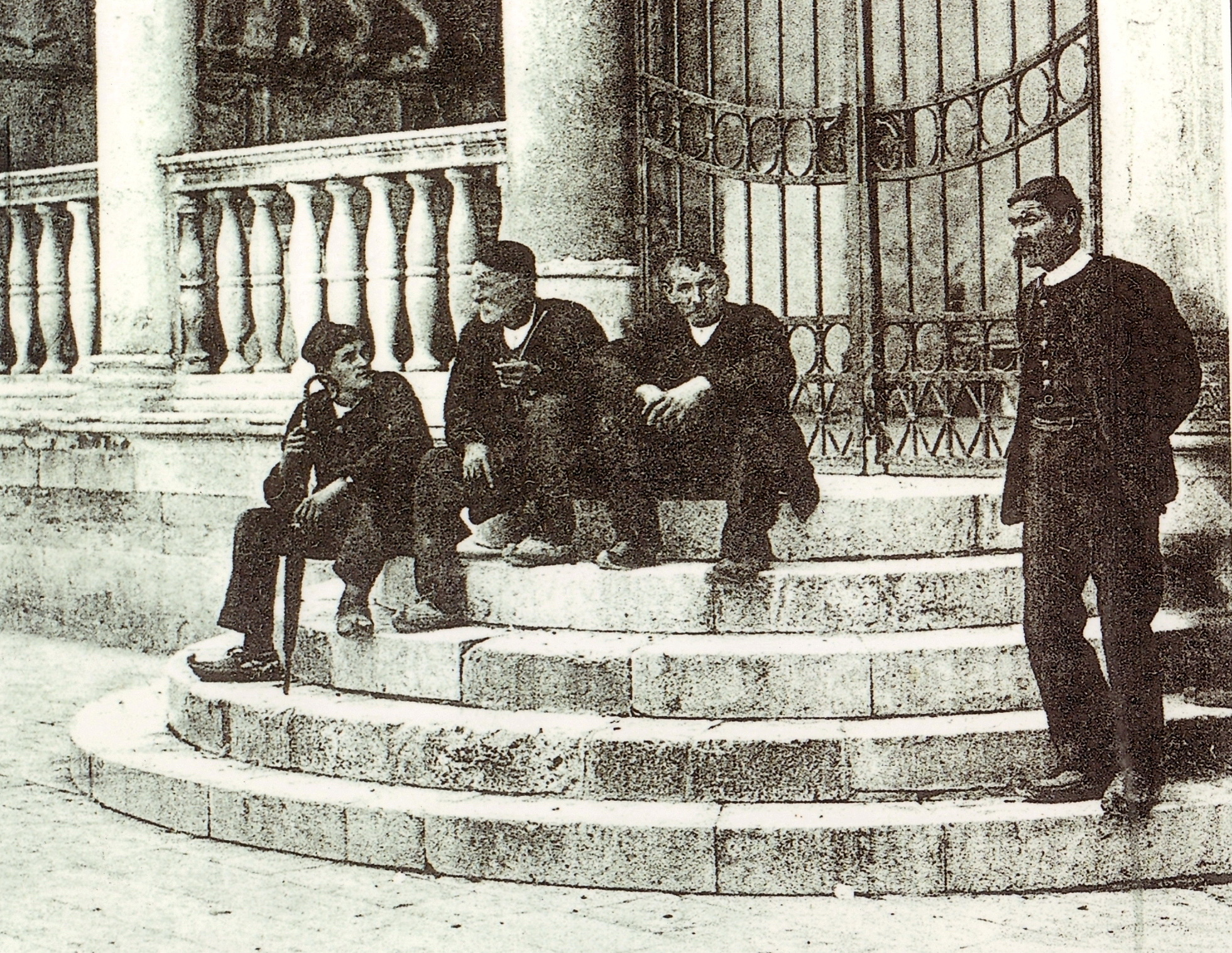 Dio trogirske razglednice s početka XX. stoljeća.